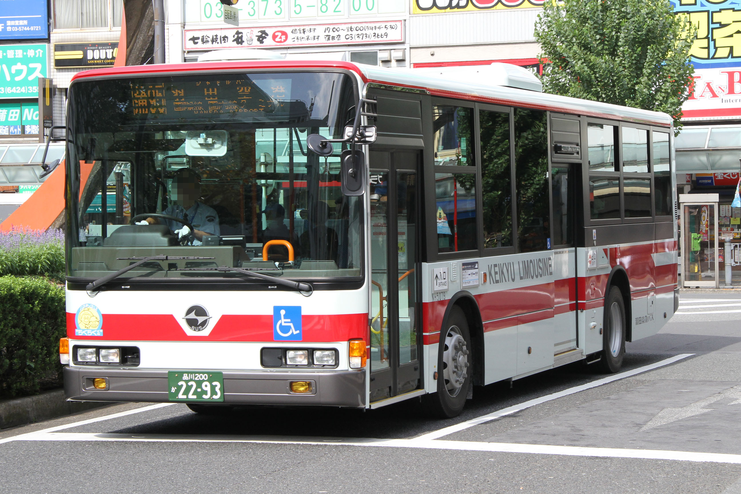 Haneda Keikyu Bus car (Haneda Airport Shuttle Bus "Kama 95") 羽田京急バスの車両（羽田空港シャトルバス「蒲95」）